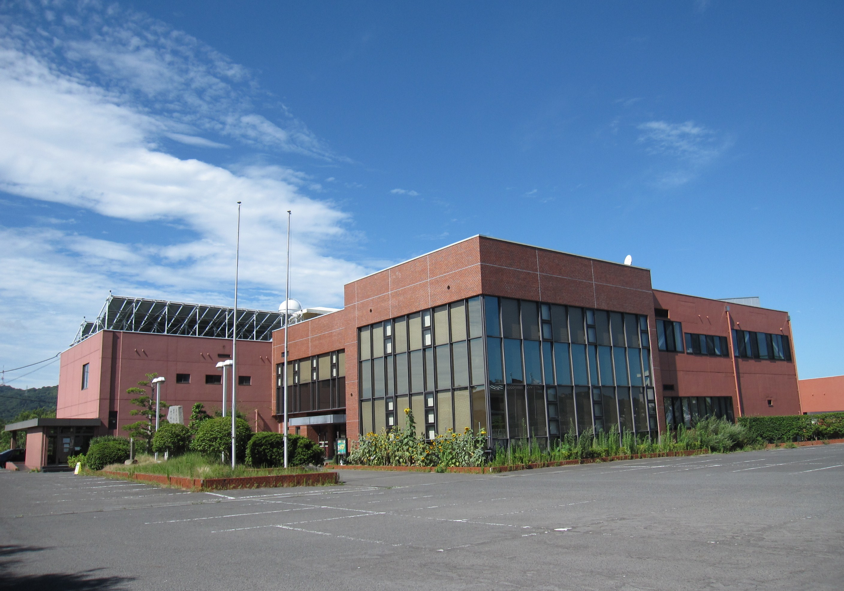 高松市牟礼図書館